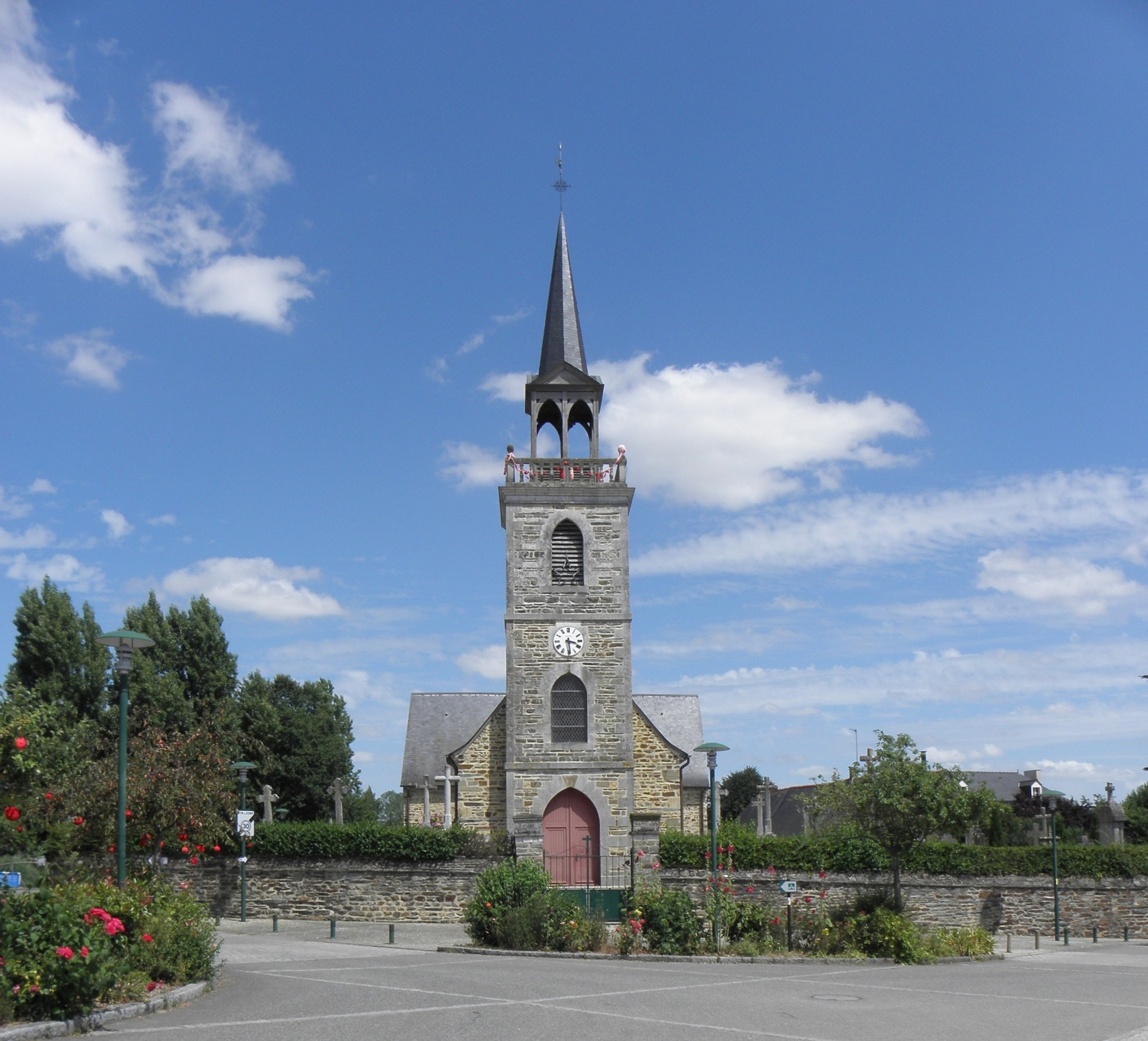 Église Saint-Aubin de Saint-Aubin-du-Pavail (35). Façade principale.